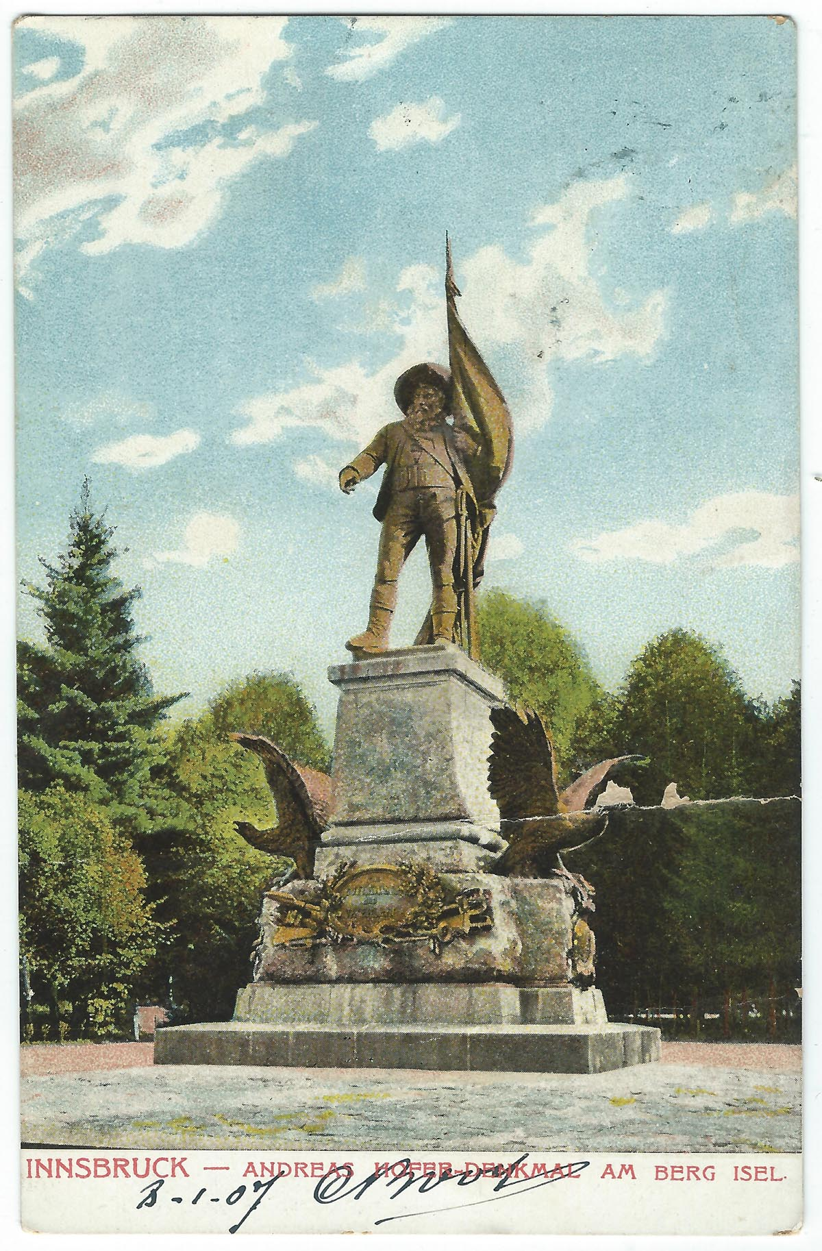 Innsbruck, Andreas-Hofer-Denkmal (Postkarte)